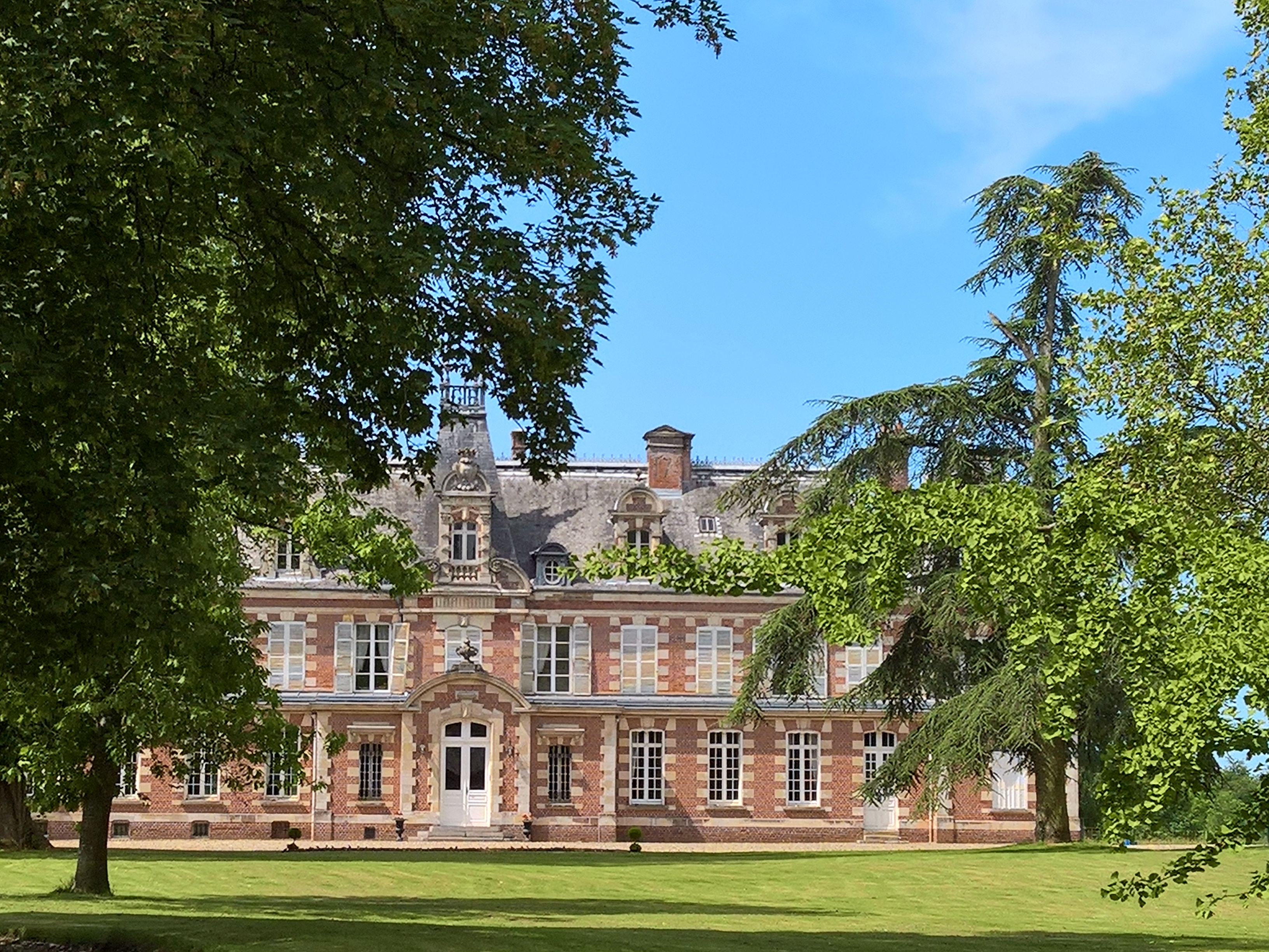 Le Château de Loueuse